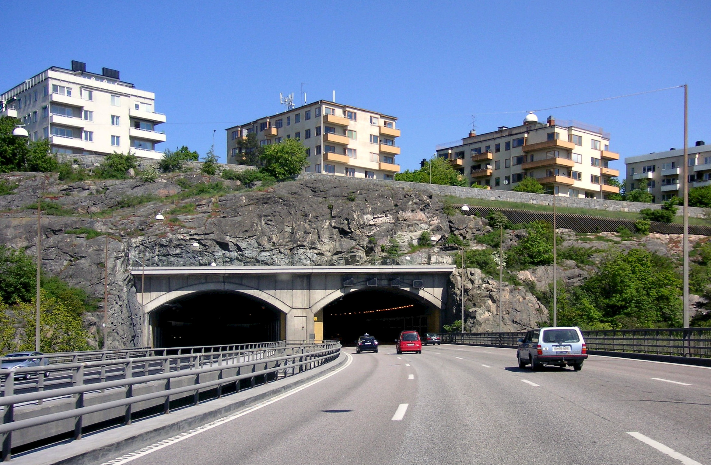 Infarten till Fredhällstunneln från Essingeleden (norrgående) i Stockholm